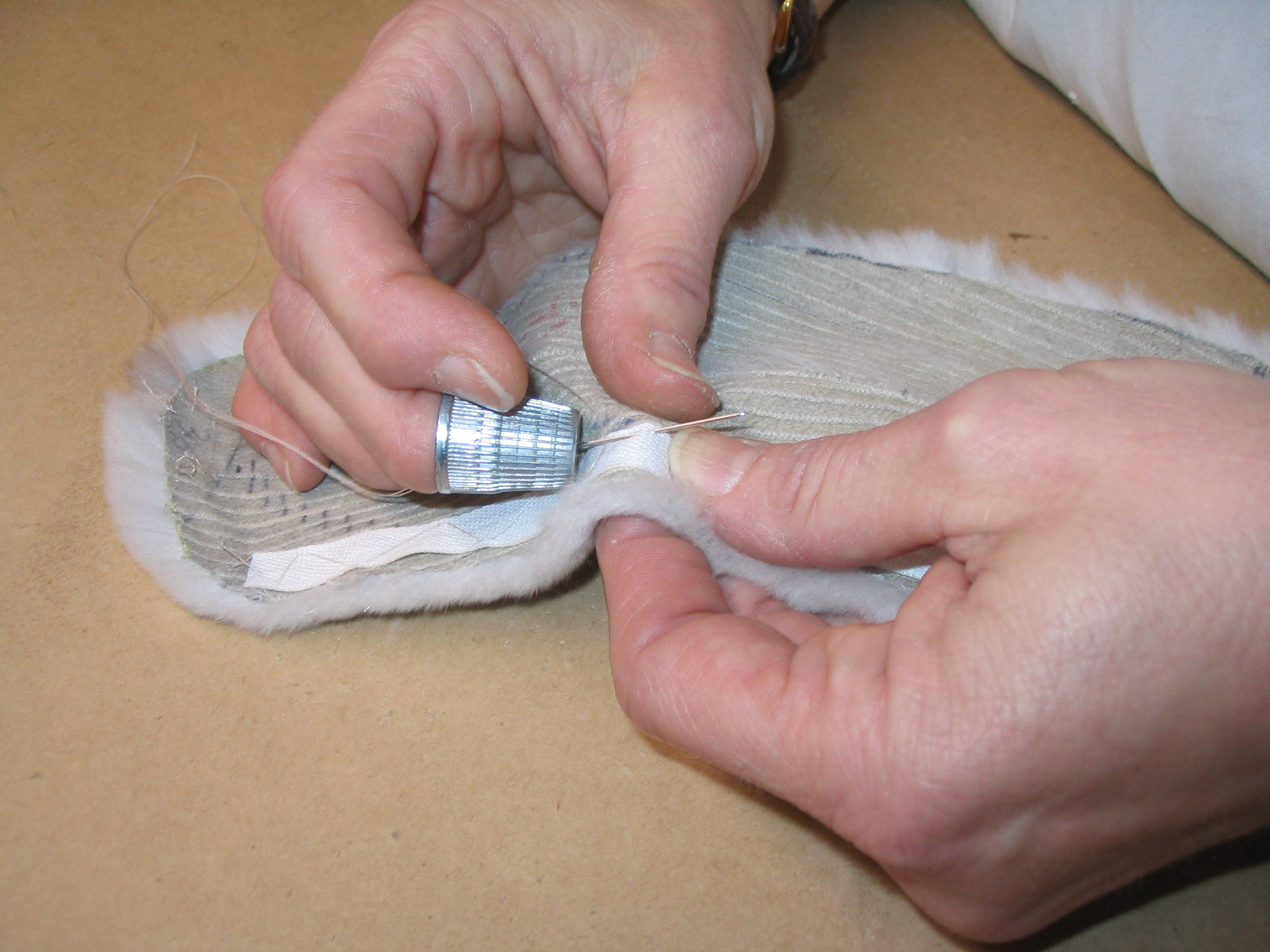 Handbändeln eines Pelzunterkragens. Gesehen im Pelzatelier Halfmann, Düsseldorf.